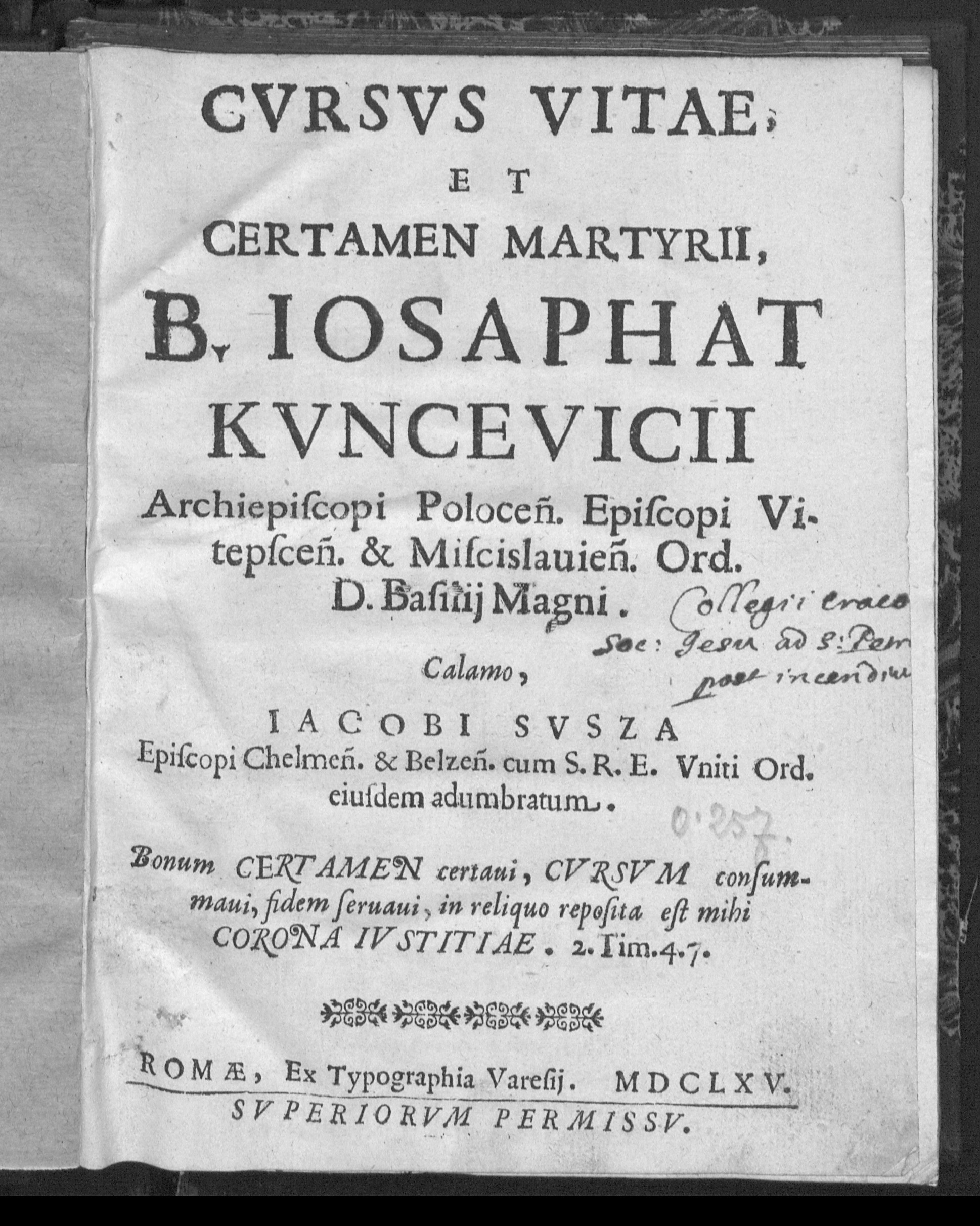 Jakub Susza, Cursus vitae et certamen martyrii B. Josaphat Kuncevicii archiepiscopis polocensis..., Romae 1665